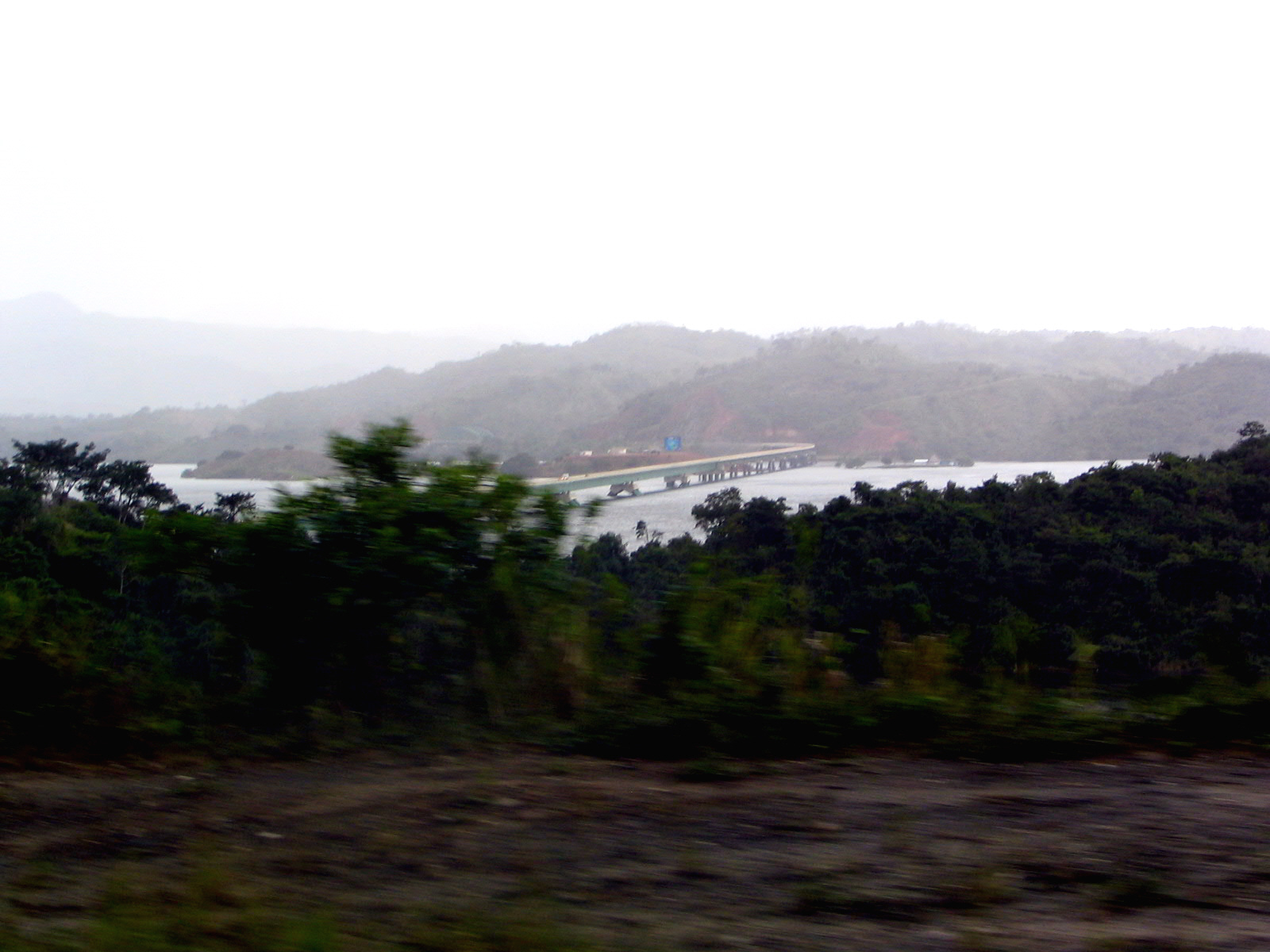 Chiapas-Brücke von weitem.